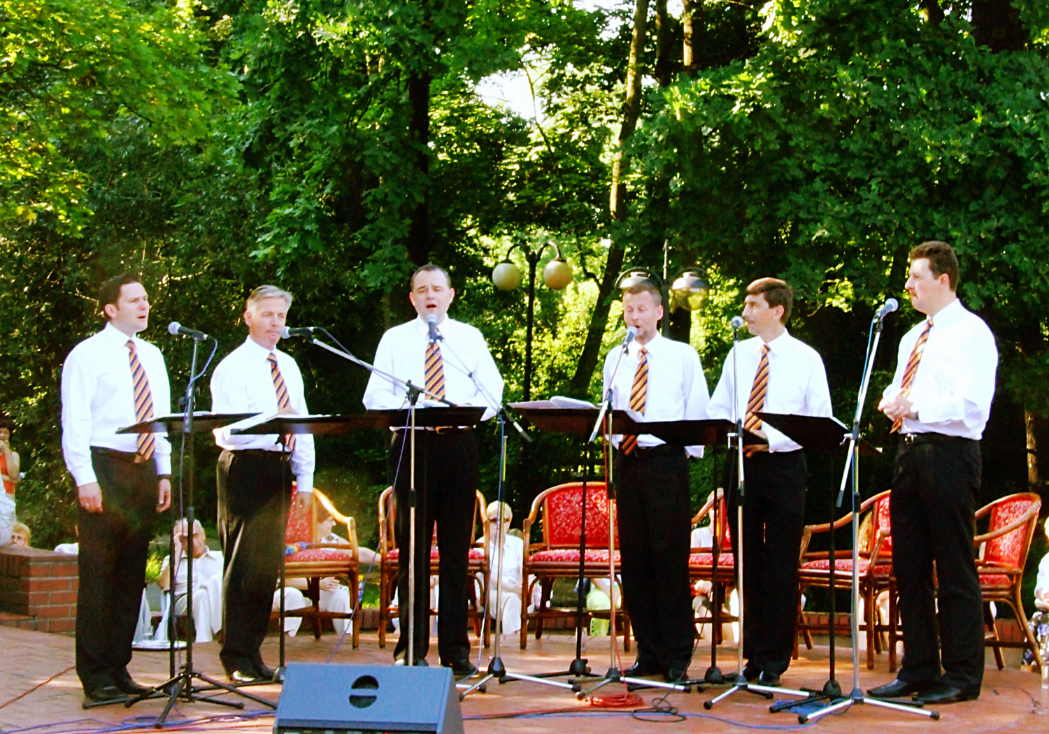 Zespół wokany Affabre_Concinui; zdjęcie z koncertu w Parku Sołackim w Poznaniu w dniu 15 lipca 2007 r.